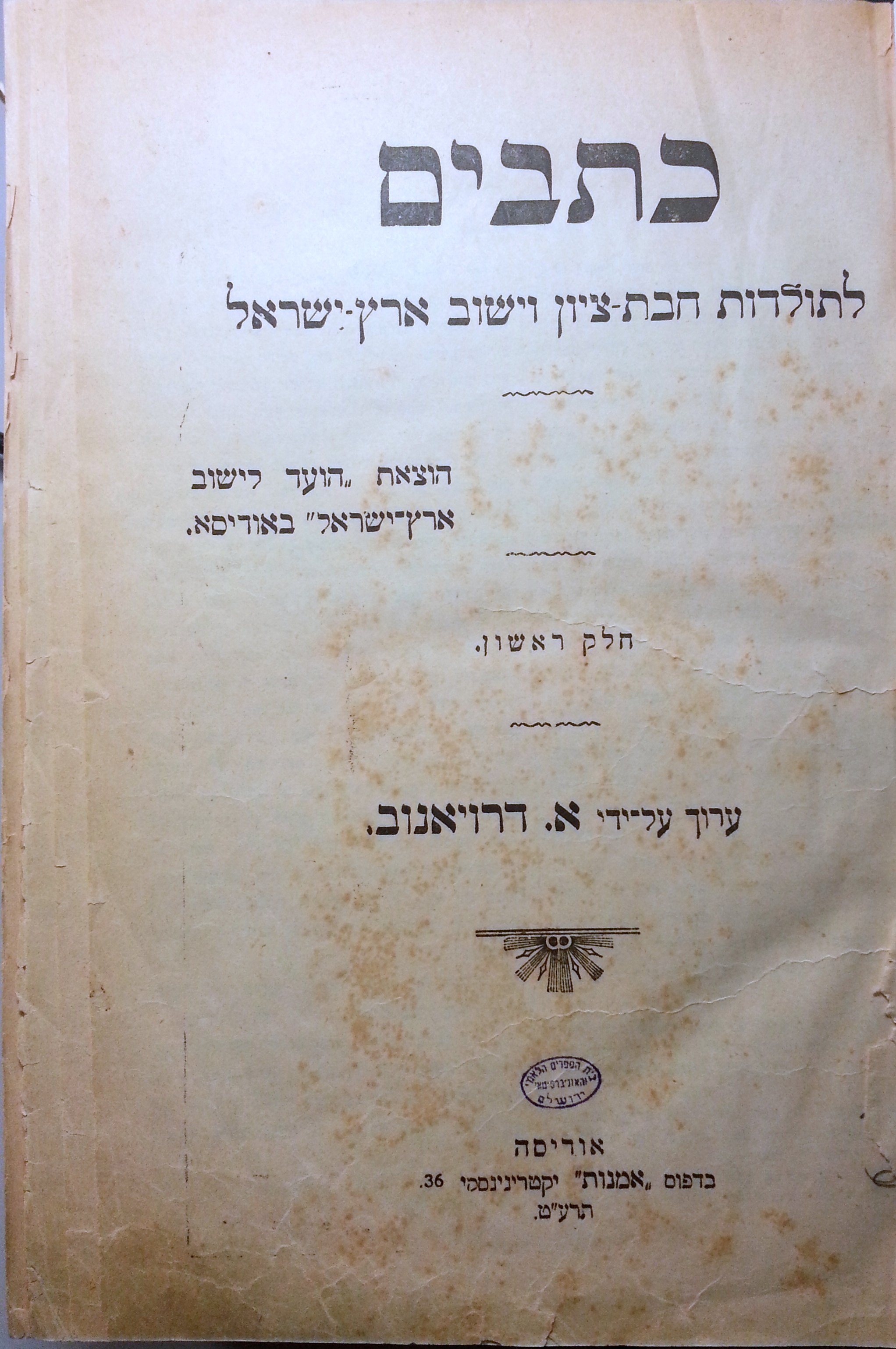 1919 כתבים לתולדות חבת ציון